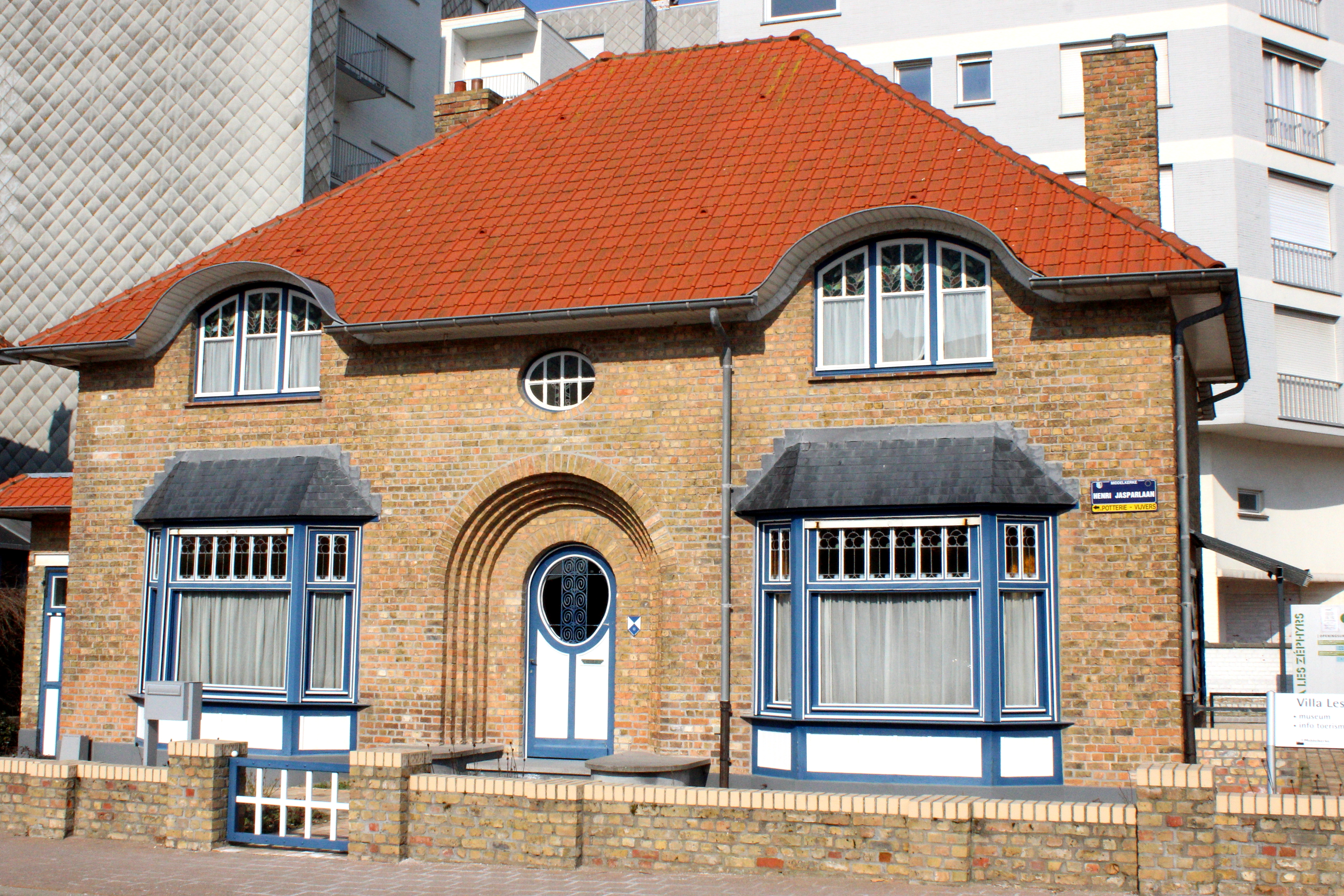 Villa Les zéphyrs, Henri Jasparlaan 173, Westende, België